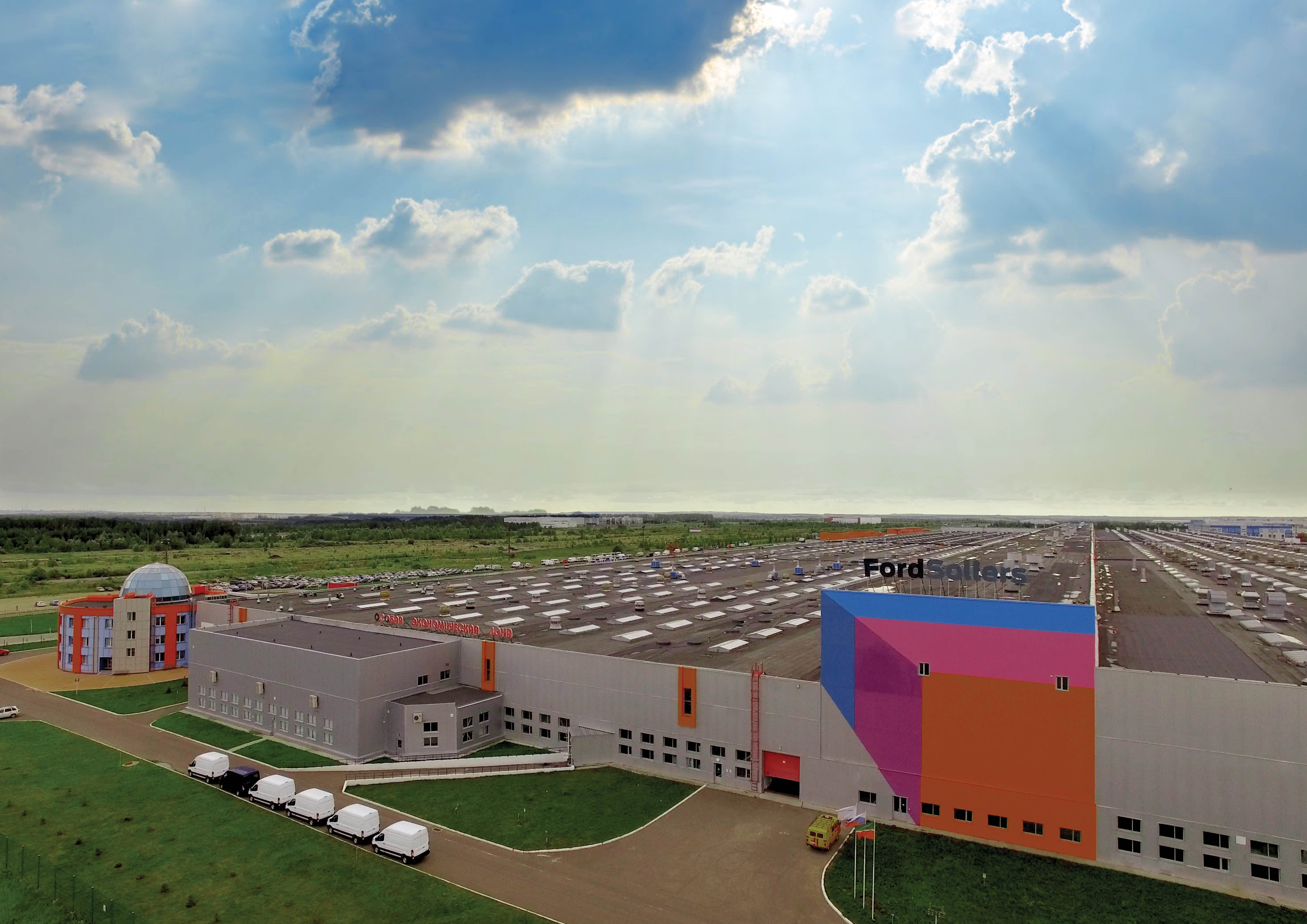 Особая экономическая зона «Алабуга», Завод «Форд Соллерс Елабуга»